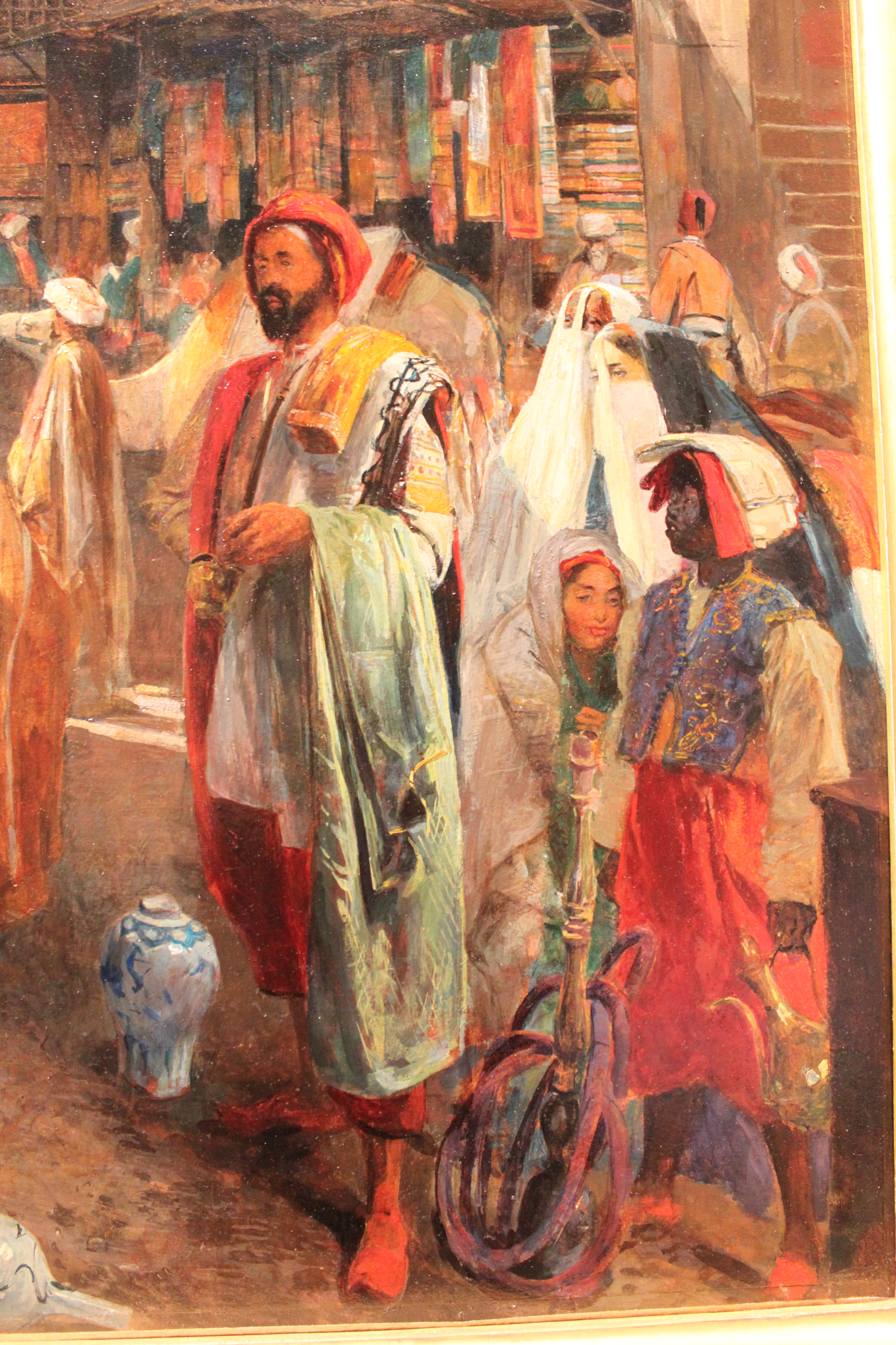 Détail de : La Rue et la Mosquée El Ghouri au Caire, tableau de John Frederick Lewis, Musée du Louvre, Paris